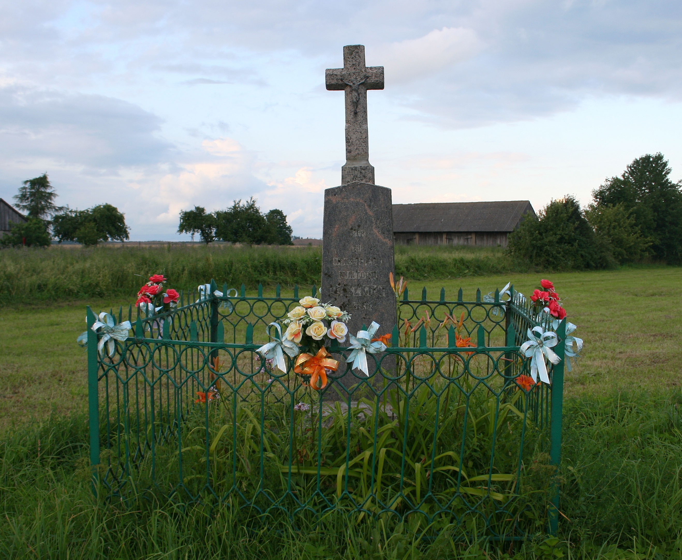 Przydrożny krzyż we wsi Nowowola, gmina Sokółka, woj. podlaskie